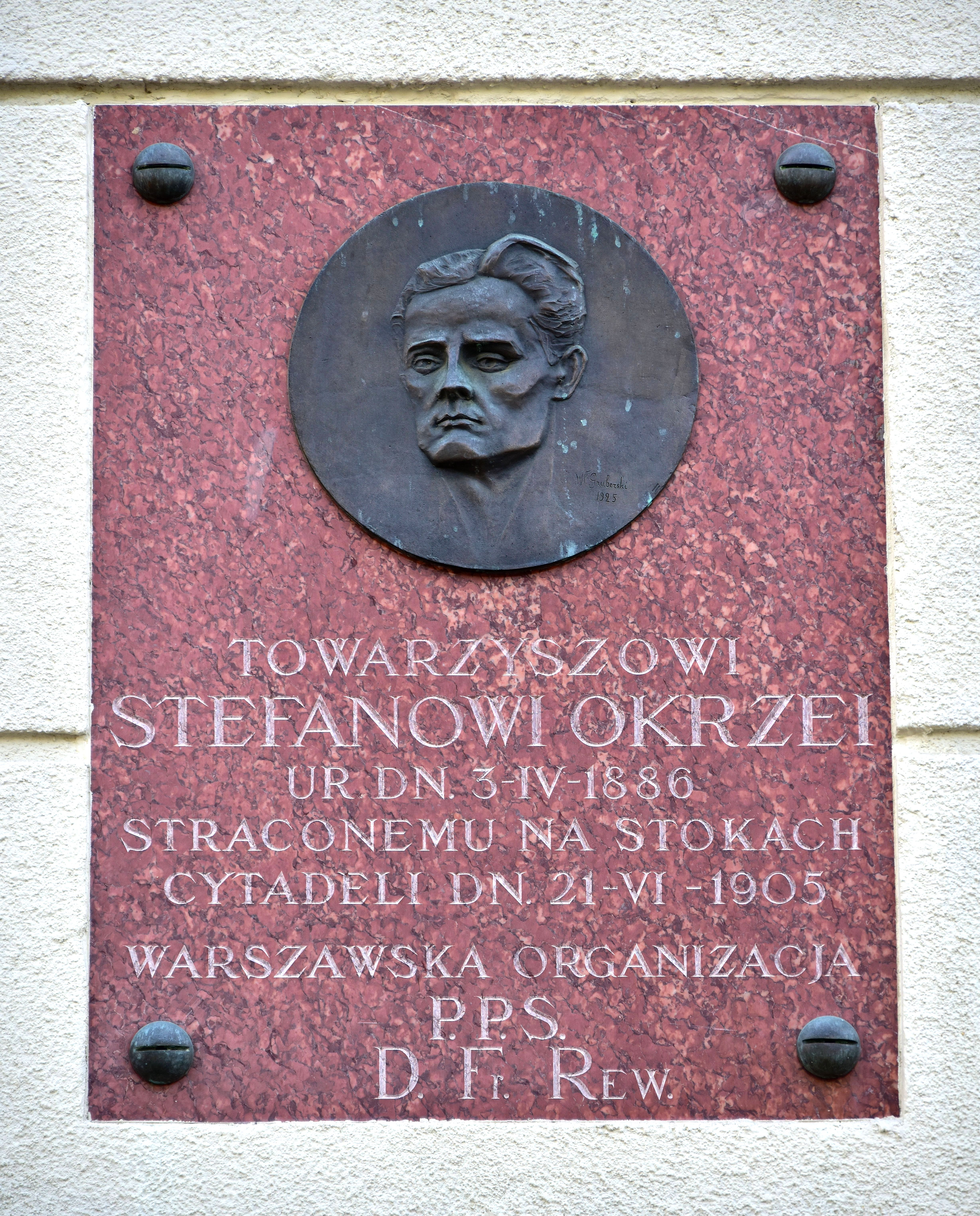 Tablica upamiętniająca Stefana Okrzeję na ul. Ogrodowej 39/41 w Warszawie